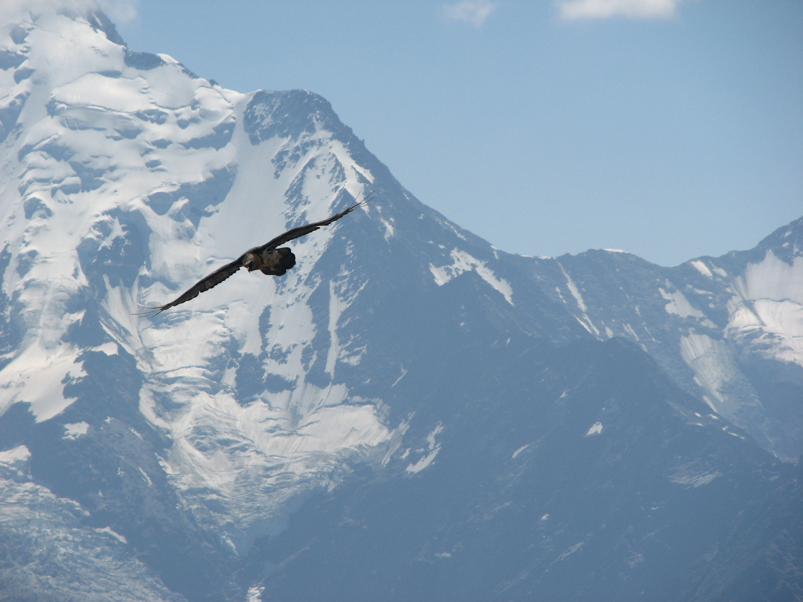 Le gypaète barbu devant les Bionnassay dans le Massif du Mont-Blanc